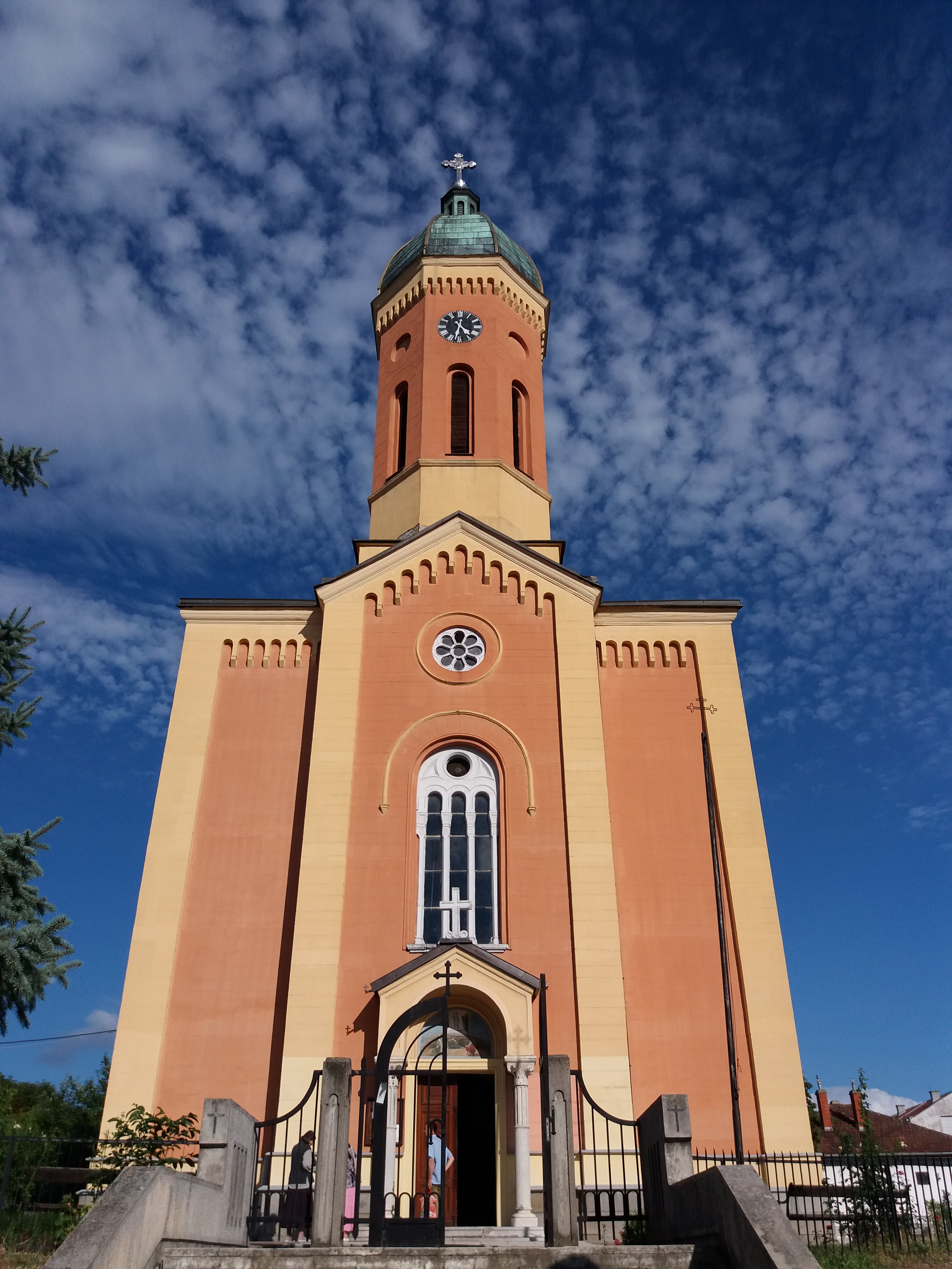 Srpski (latinica): Crkva Svetog Preobraženja, Smederevska Palanka